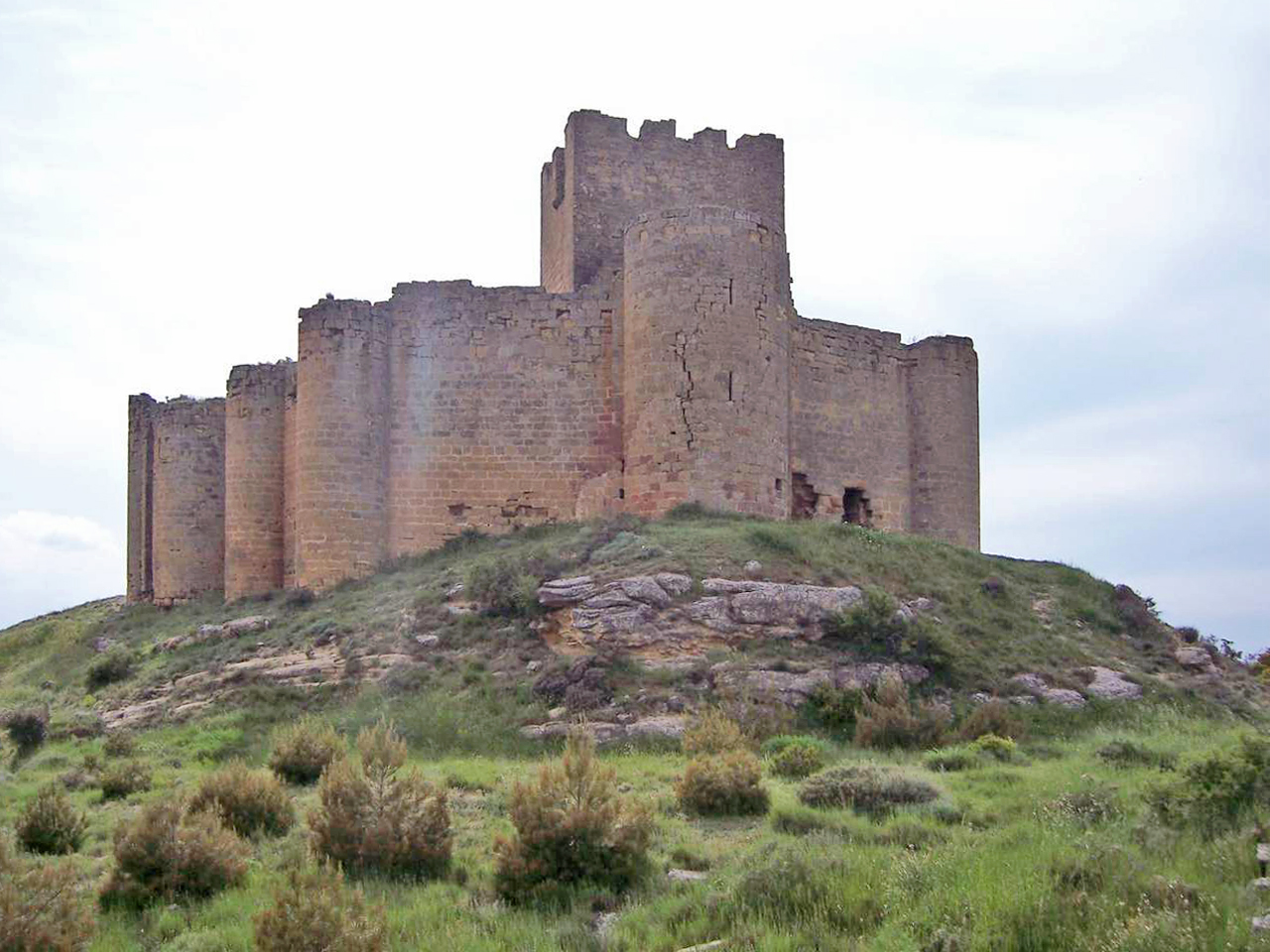 Castillo de Davalillo